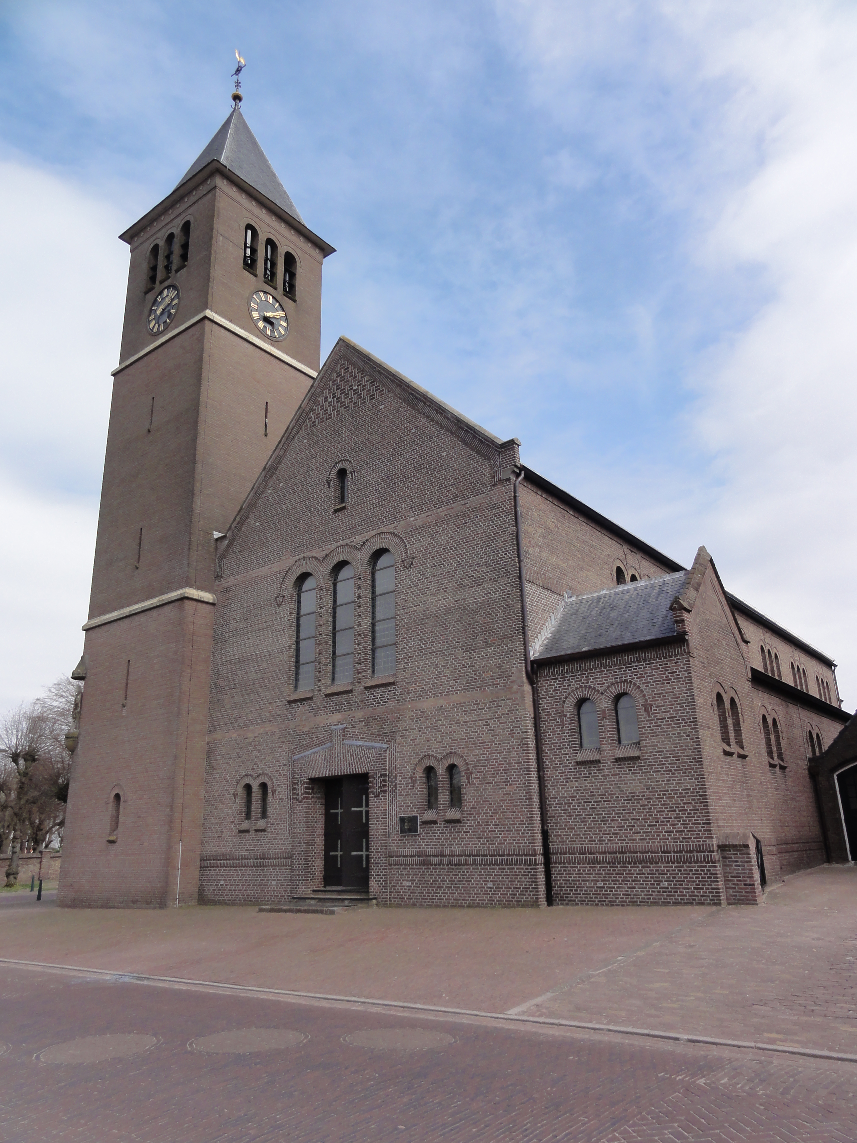 Reek (Landerd) Rijksmonument 519141 kerk H. Antonius Abt